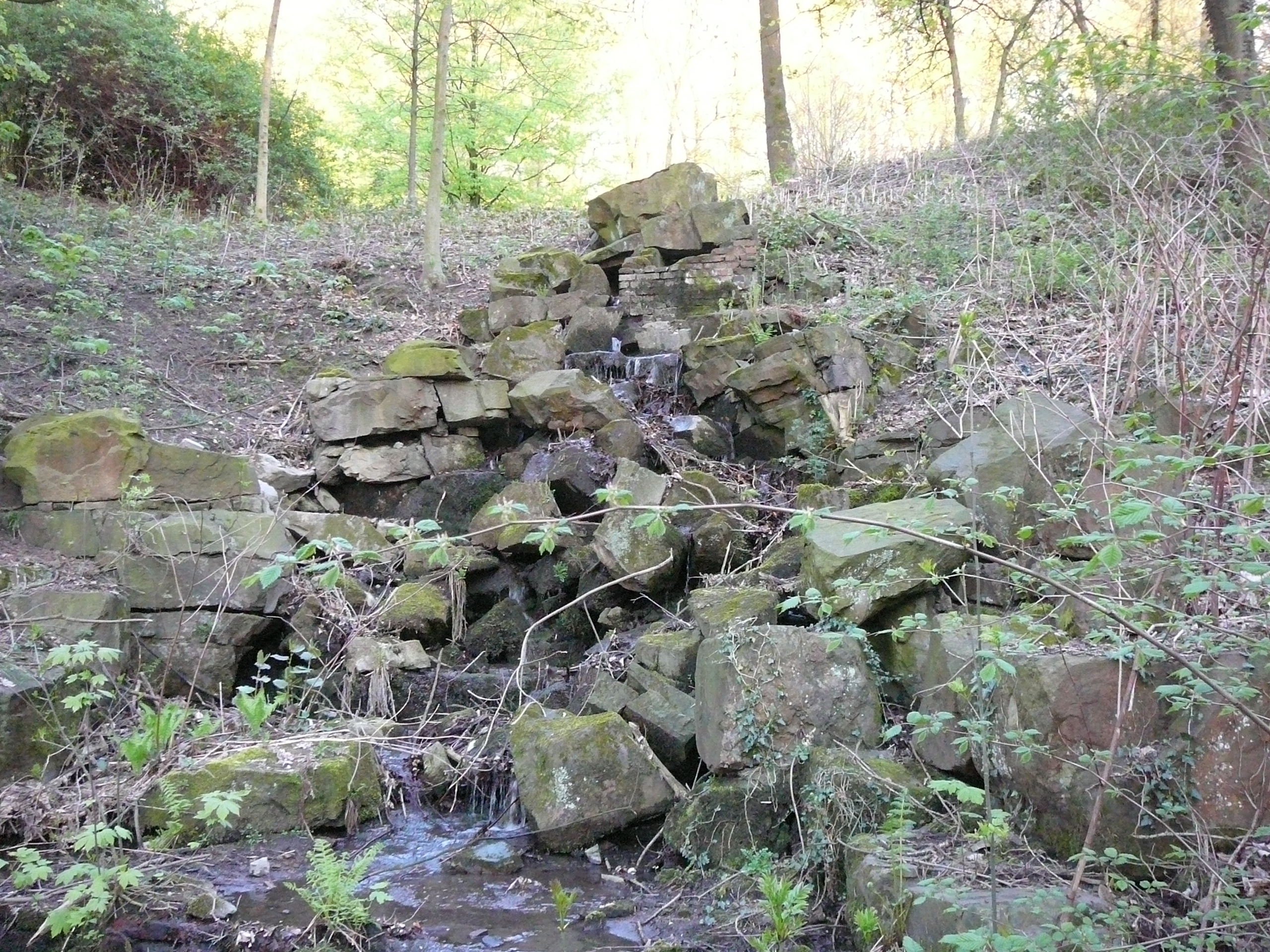 Fischertal, Wuppertal